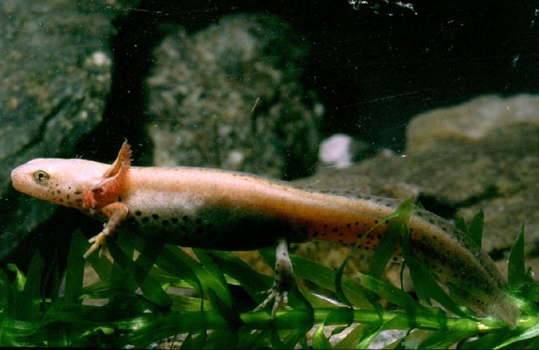 Mesotriton alpestris apuanus